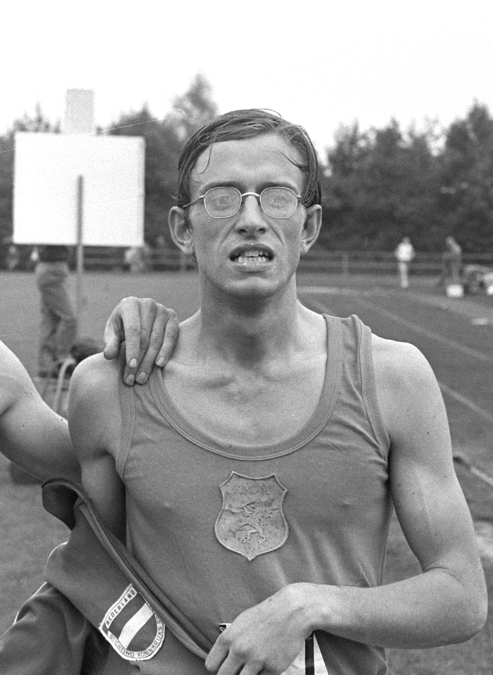 Atletiek Nederland tegen Denemarken in Groningen; Sjef Hensgens